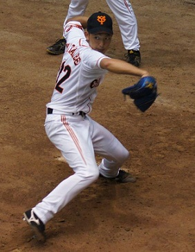 Giants_watanabe_022s